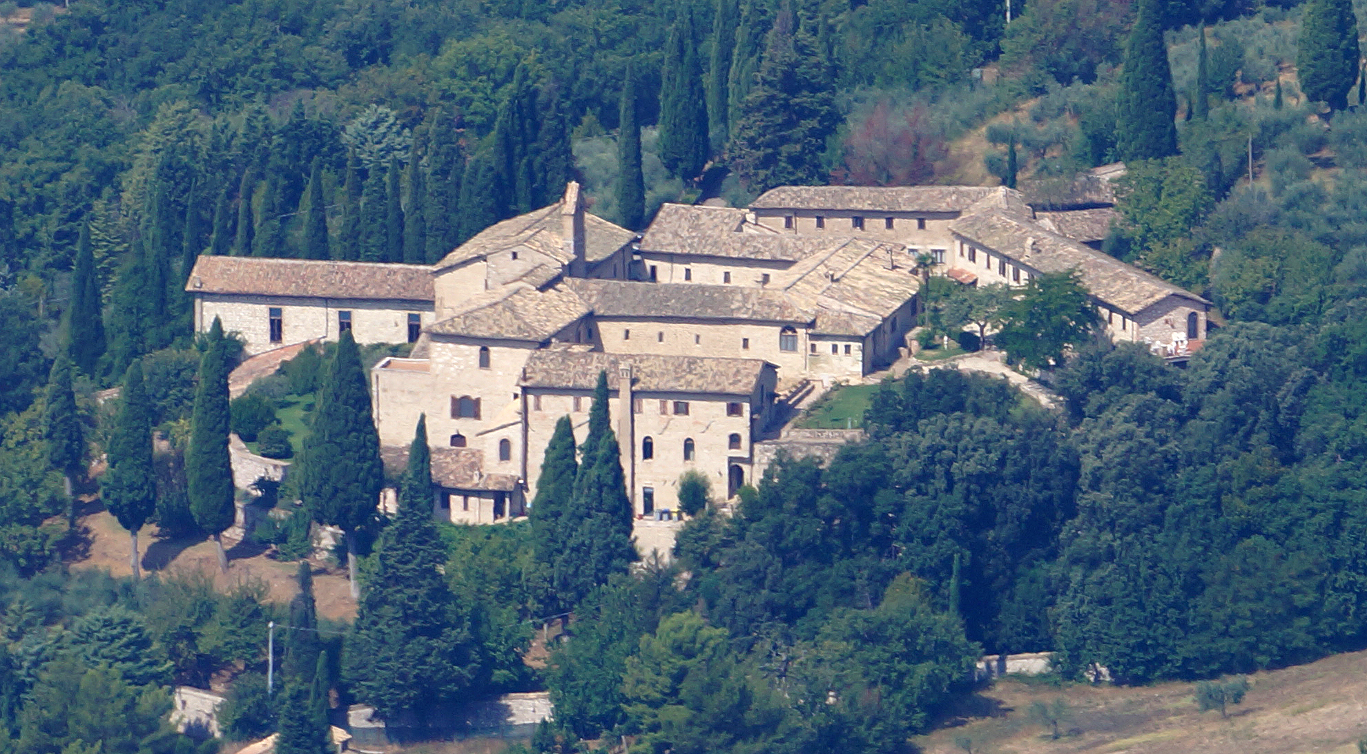 San Damiano vom Sasso Piano (Monte Subasio) aus gesehen.